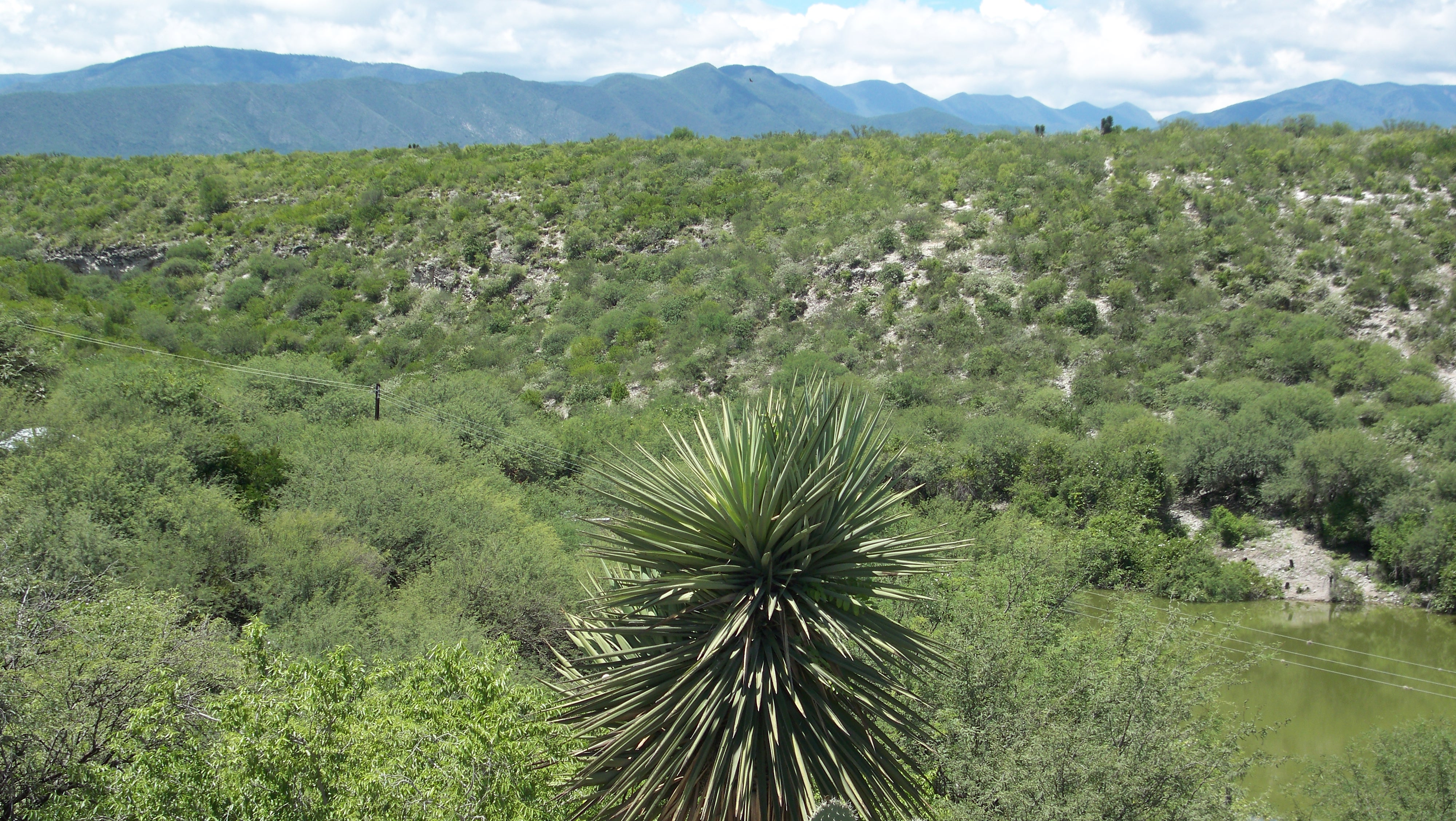 Una vista panorámica hacia la Sierra Madre Oriental 2 - La Independencia, Jaumave, Tam.